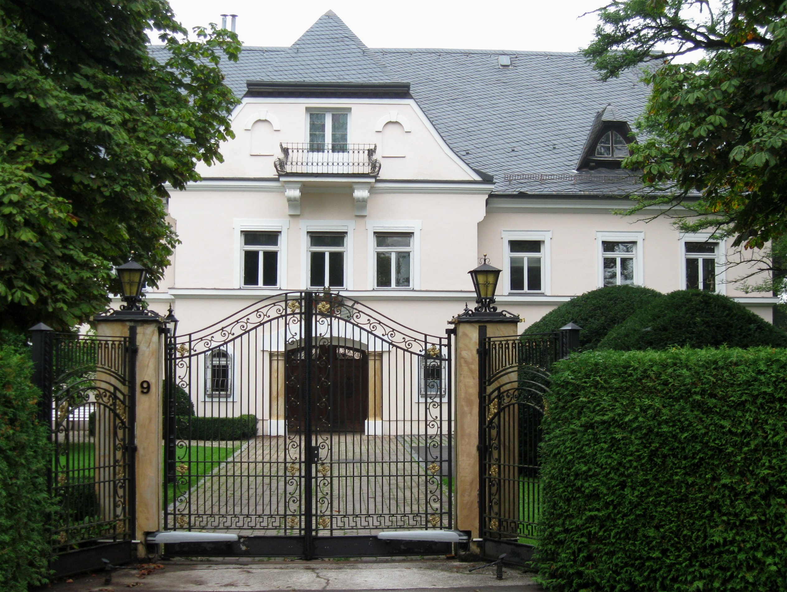 Pullach 9. Schloss Pullach, ehem. Edelsitz, Wasserschloss, Vierseitenanlage auf altem Burgstall mit zweigeschossigen Bauten mit abgewalmten Schieferdächern, westlichem Turm mit Zeltdach, östlichem Risalit mit Walmdach, südlichem Giebelrisalit mit Tordurchfahrt im Stil des Historismus, Ende 19. Jh.; Parkanlagen mit Wassergraben.